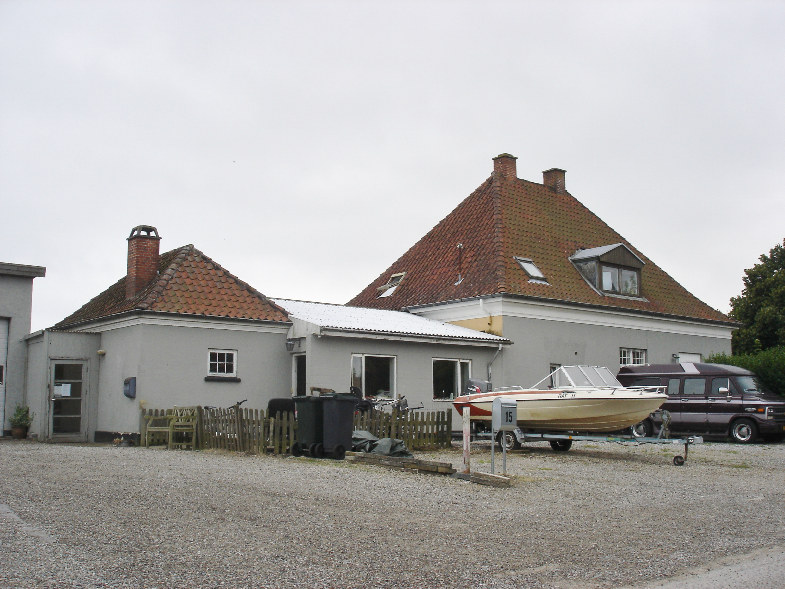 Sønder Ørslev Station